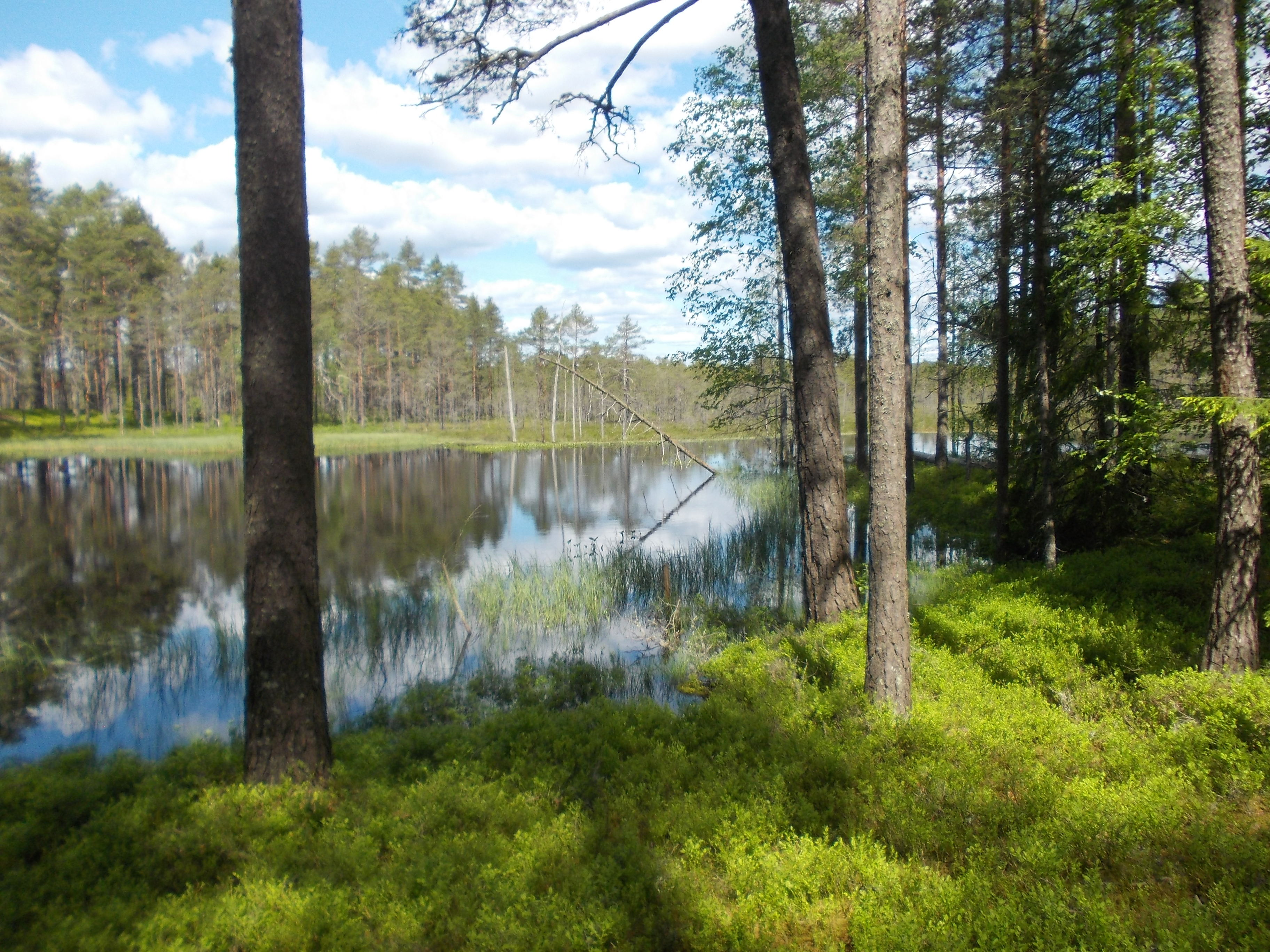 Torptjärnen är en liten sjö i Kilsbergen (i Lekebergs kommun).